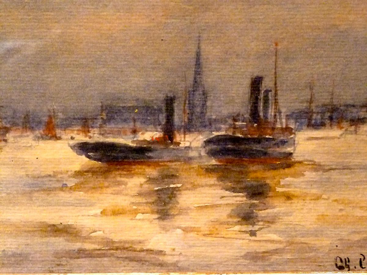 Une aquarelle illustrant un port de la Rochelle